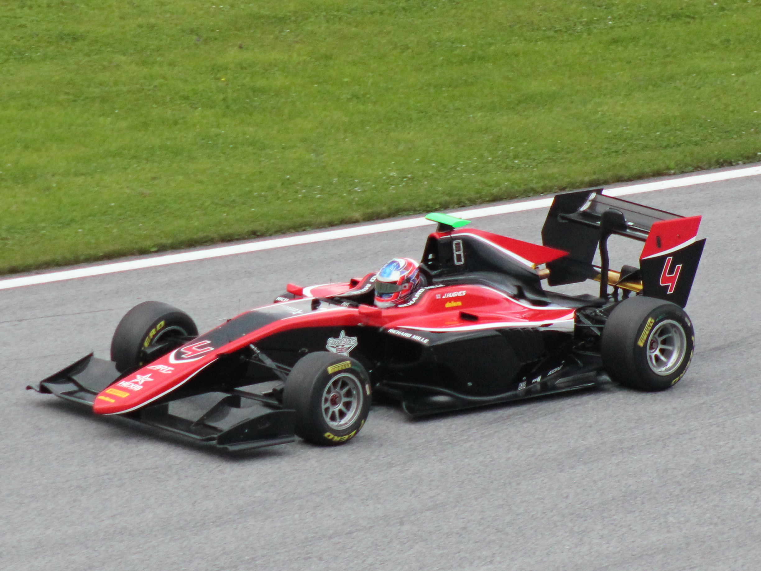 04 Jake Hughes beim Rennwochenende in Österreich 2018 (1)